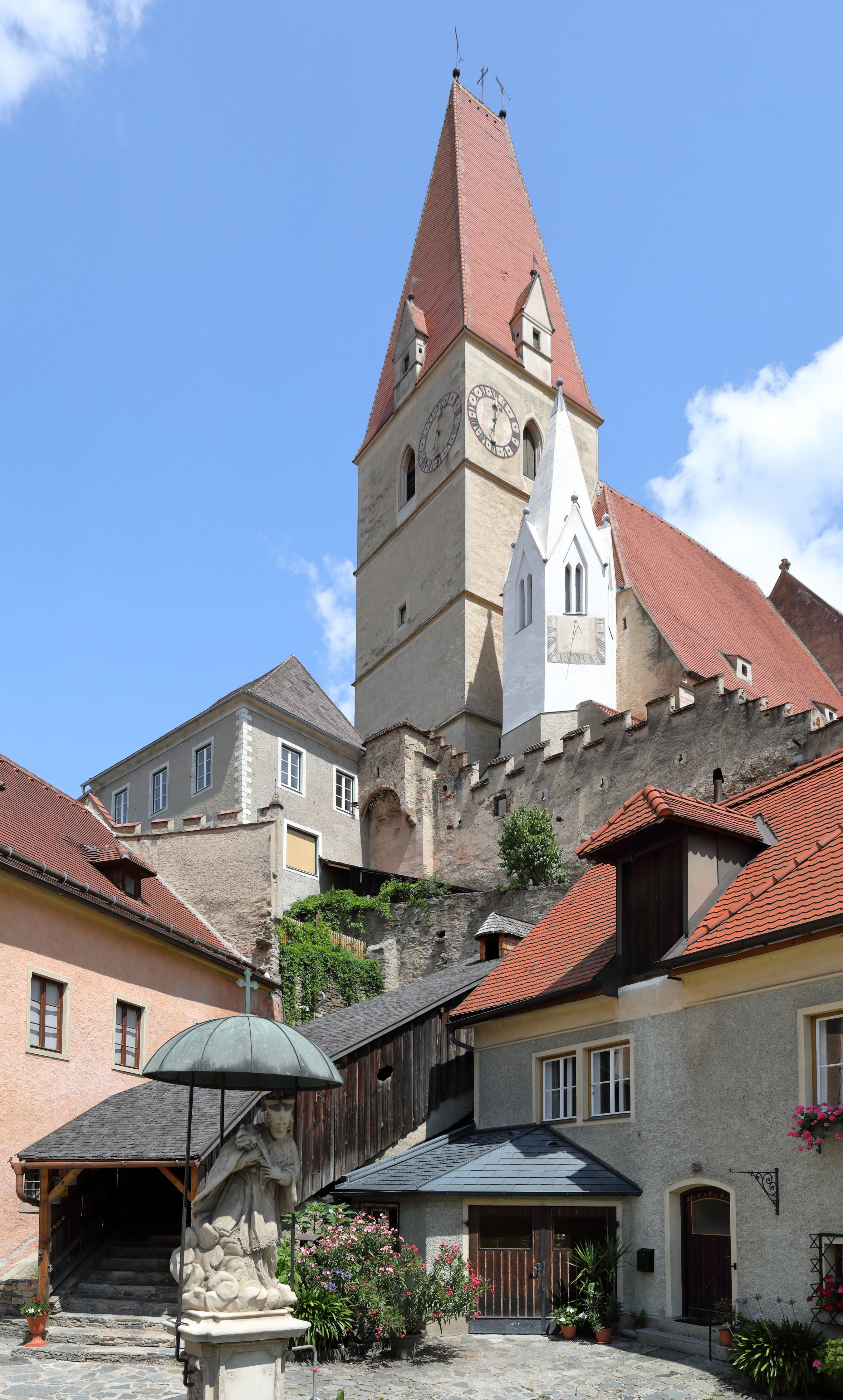 Blick vom Marktplatz zur röm.-kath. Pfarrkirche Mariae Himmelfahrt in der niederösterreichischen Marktgemeinde Weißenkirchen in der Wachau.Im Vordergrund eine Nepomukstatue aus dem Jahr 1733 und dahinter der gedeckte Stiegenaufgang von 1531. Rechts das denkmalgeschützte Wohnhaus mit der Adresse Marktplatz 21 und ganz links das Wachaumuseum.